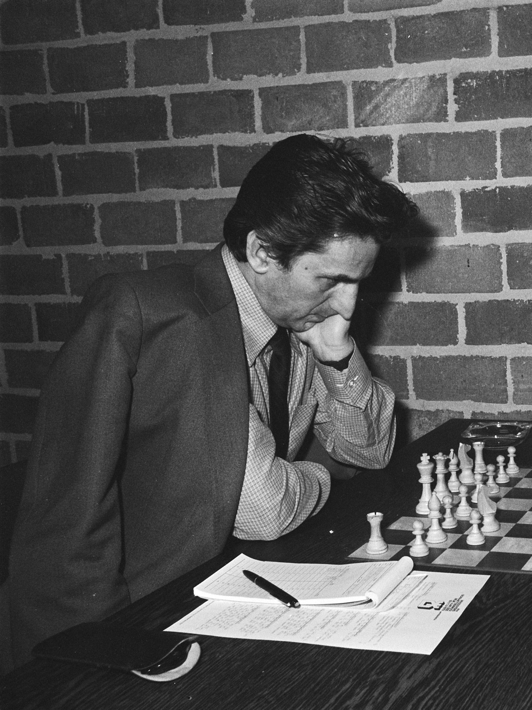 Hoogovenschaaktoernooi 1979, 2e ronde; Juraj Nikolac.